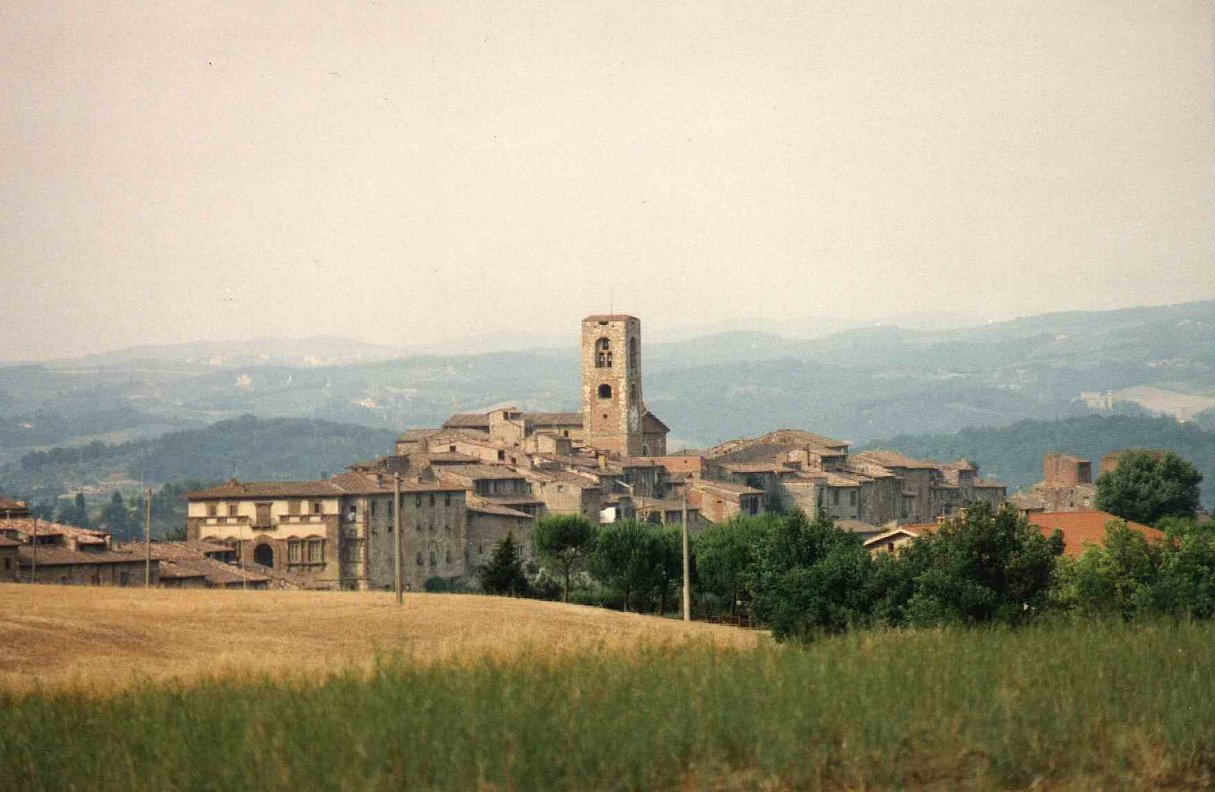 Colle di Val d'Elsa (Siena-Italia): panorama di Colle Alta